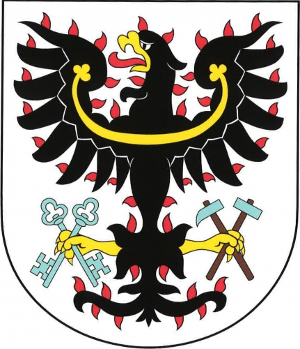 znak, Petrovice I, okres Kutná Hora